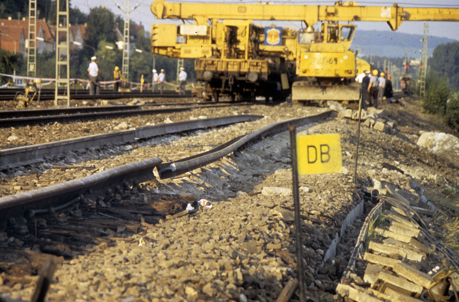 Unfallstelle des Eisenbahnunfalls bei Heilbronn-Klingenberg vom 12. August 1984.